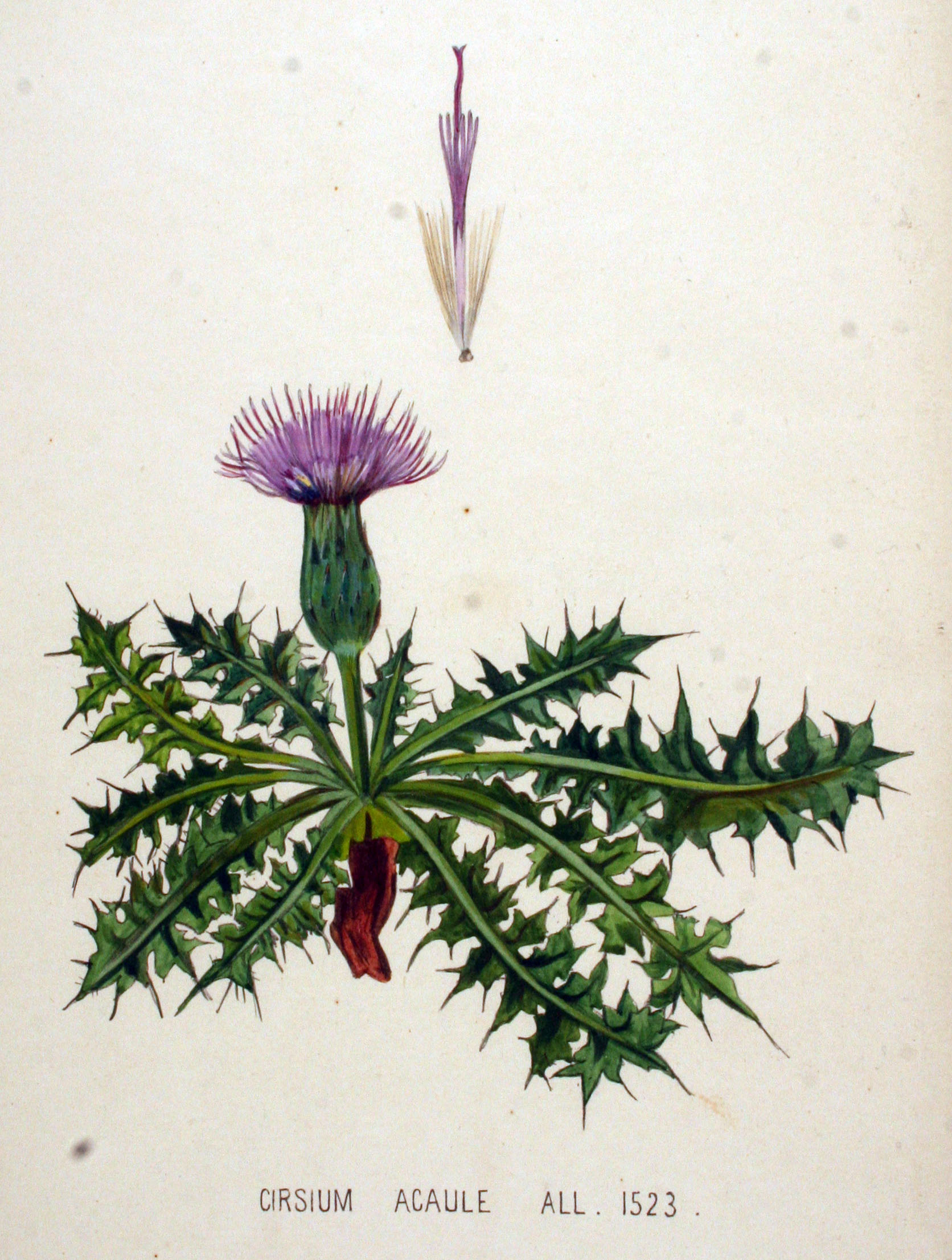 Cirsium acaule Scop.